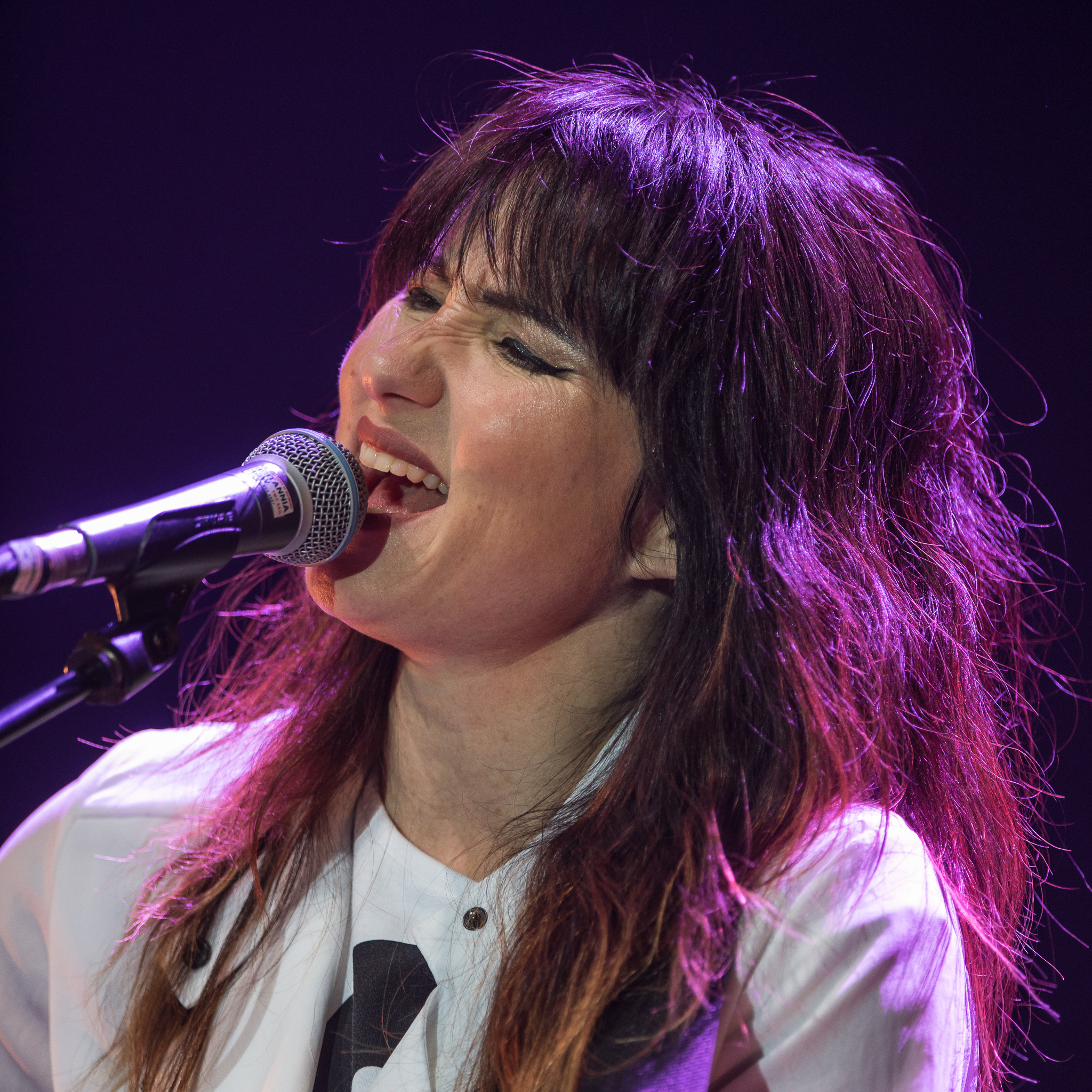 Concertbüro Franken,KT Tunstall,Kate Victoria „KT“ Tunstall,Konzert,Livekonzert,Livemusik,Meistersingerhalle